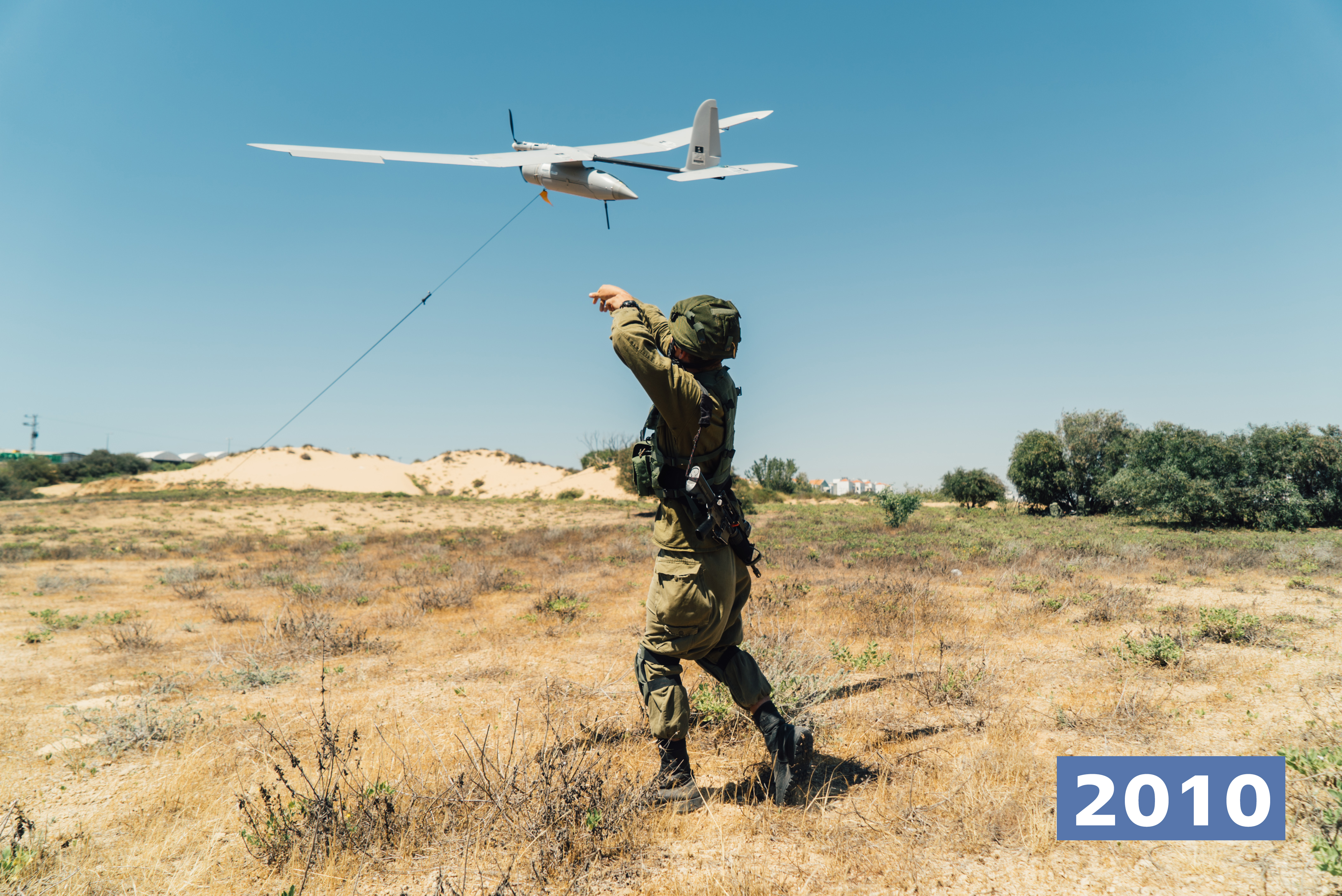 הקמת רוכ"ש.